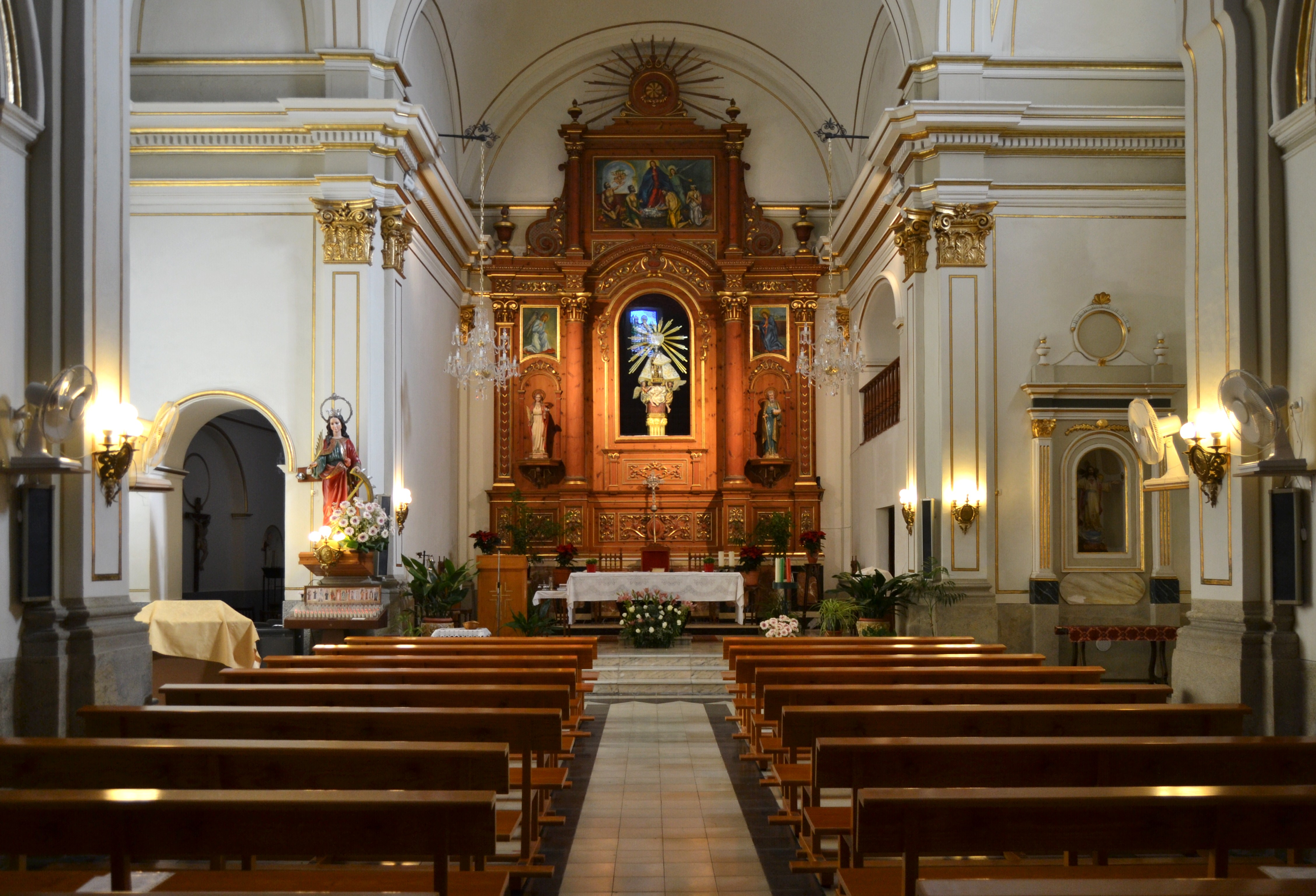 Interior de l'església de santa Caterina, Senija, Marina Alta.